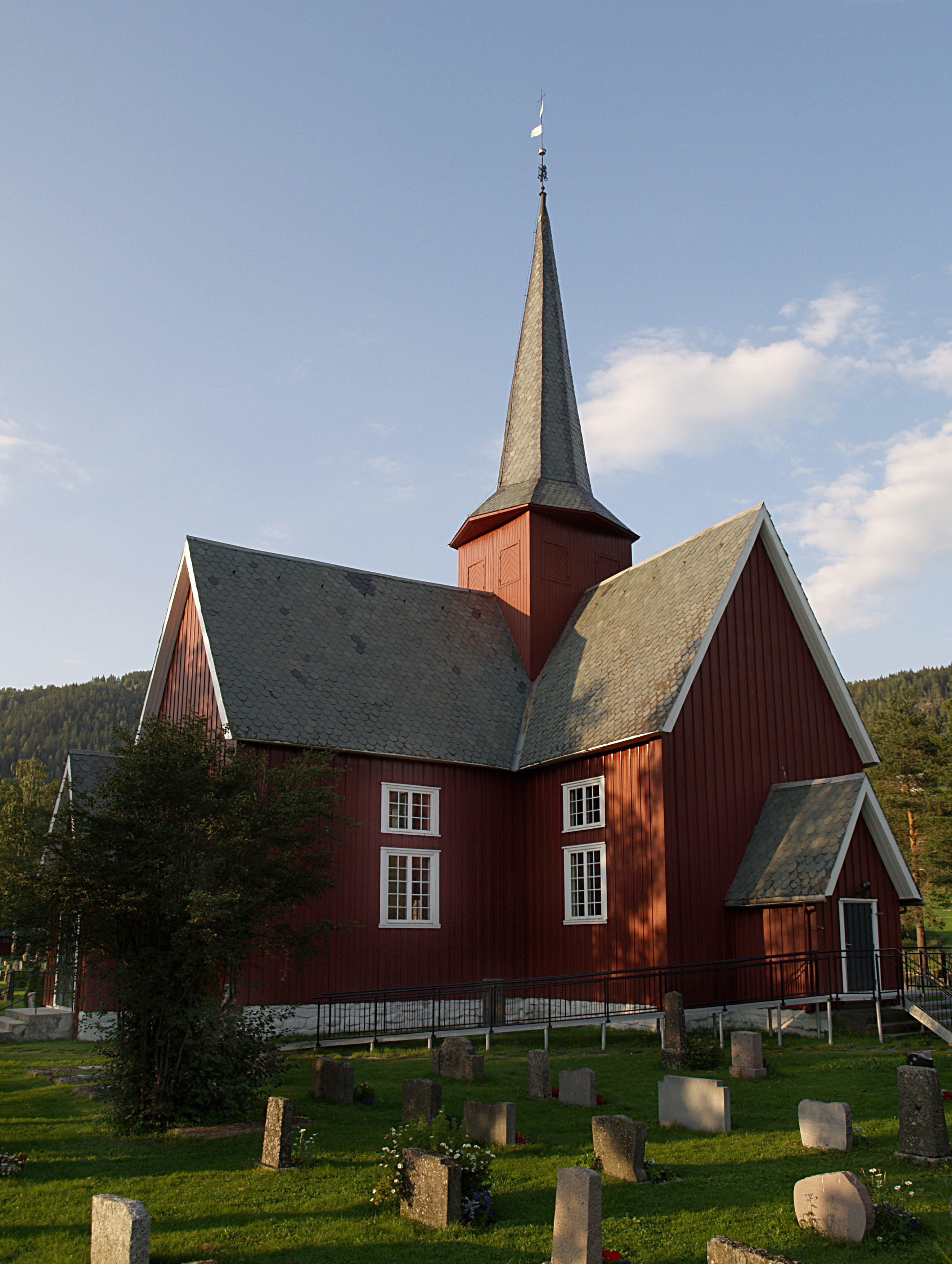 Bagn kirke